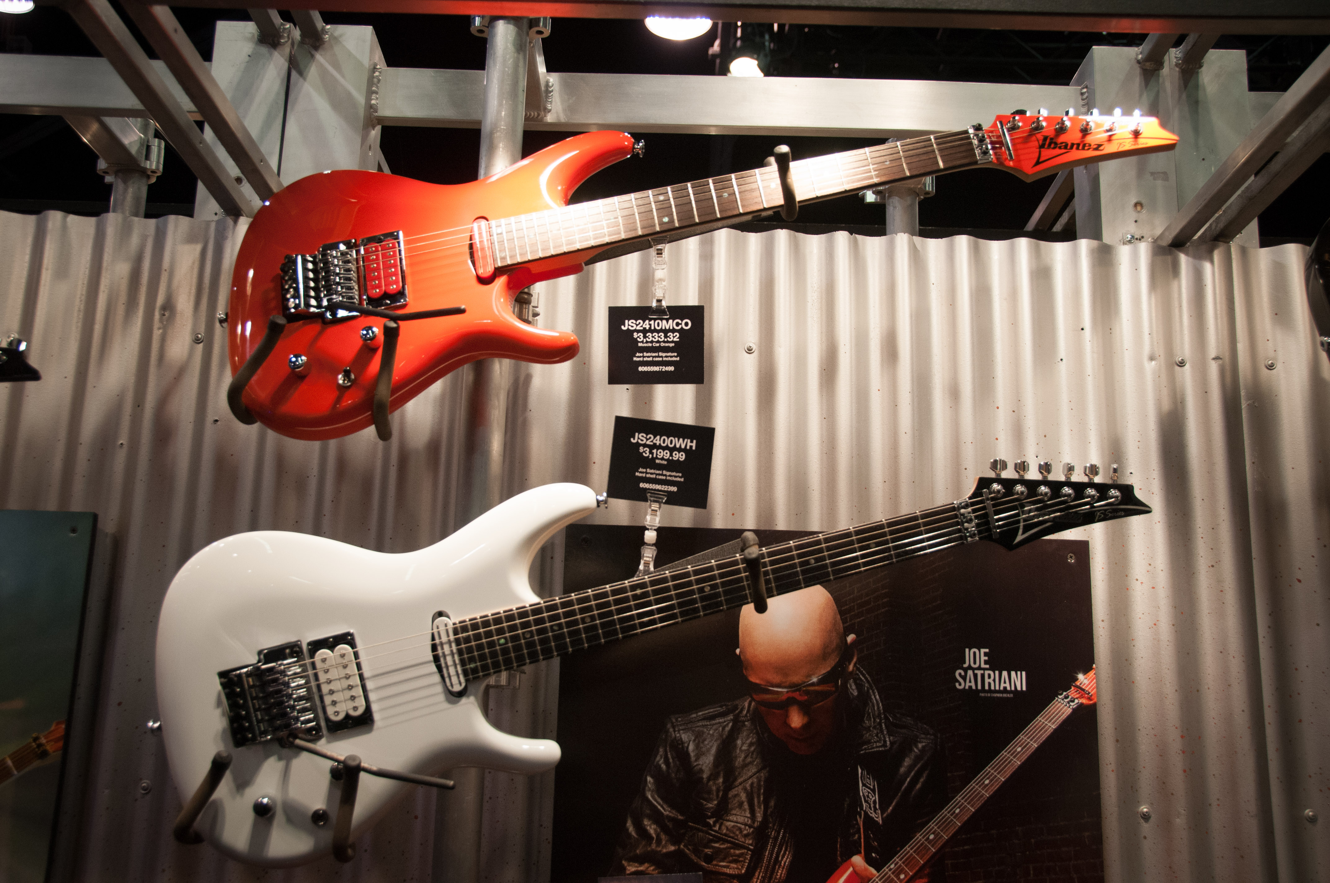 Ibanez Joe Satriani guitars